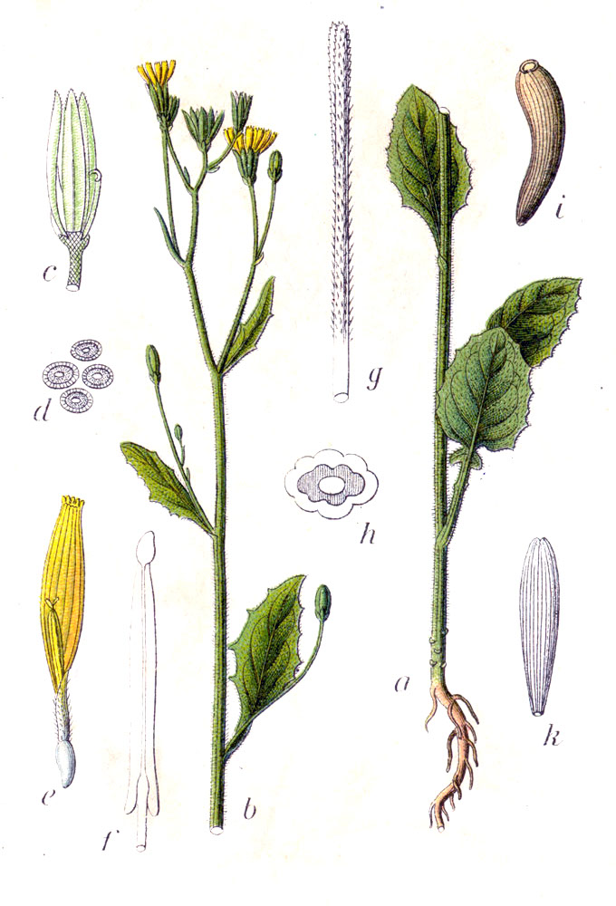 Lapsana communis L. Original Caption Rainkohl, Lampsana communis